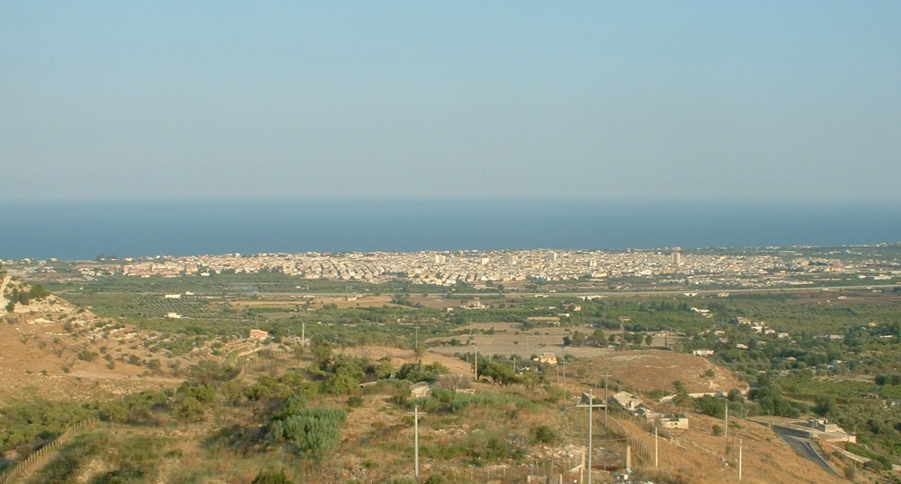 Avola (SR), View from Avola Antica.